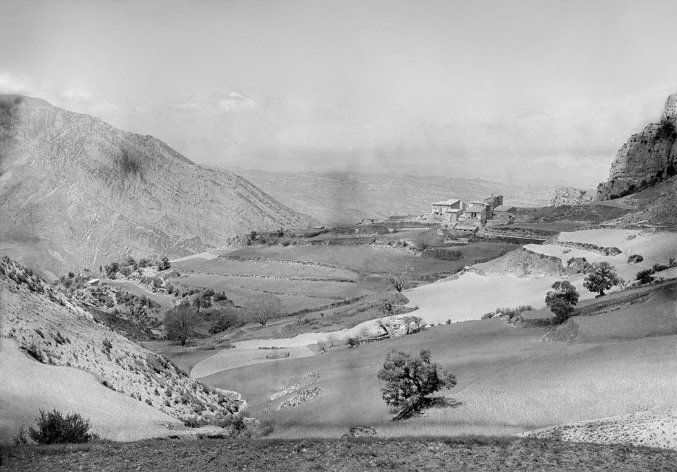 Imatge